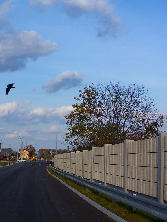 By-road by skalica